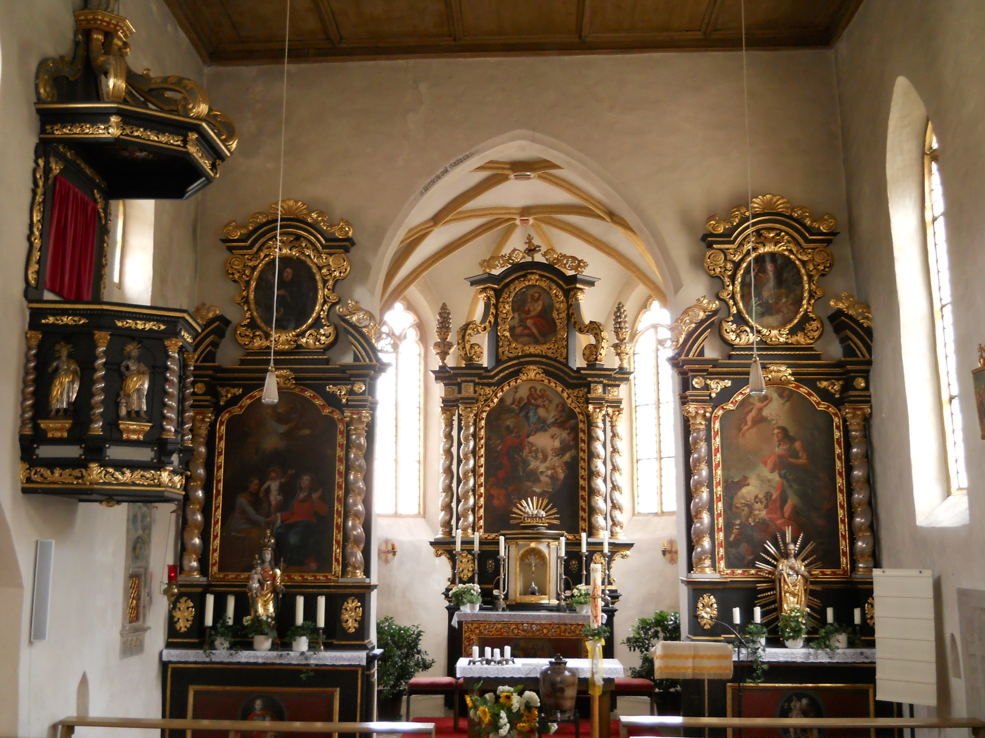 Kirche von Wasserzell, Ortsteil von Eichstätt in Oberbayern, Barockausstattung